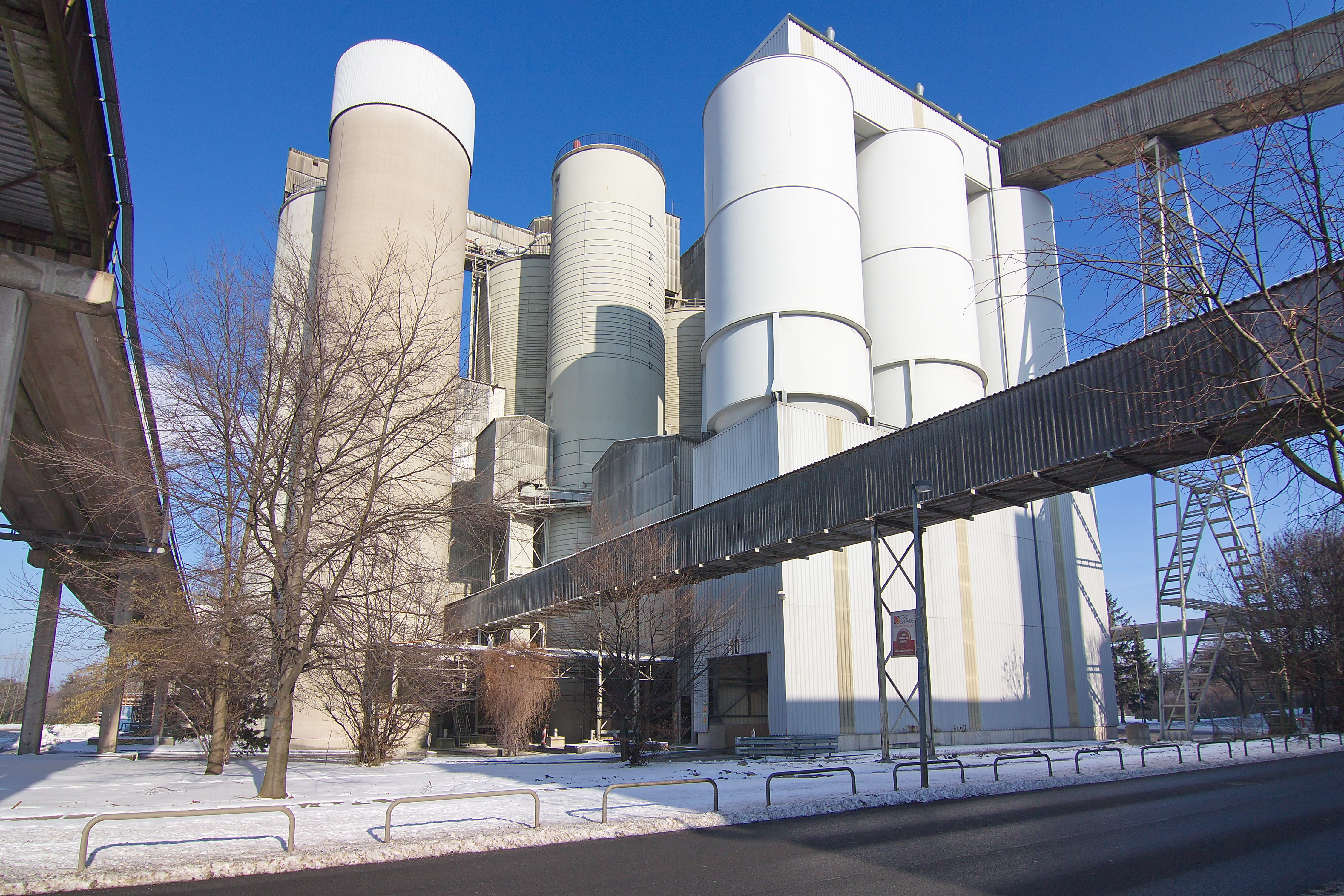 Zementfabrik der Holcim Ltd. an der Hannoversche Straße in Höver (Sehnde), Niedersachsen, Deutschland